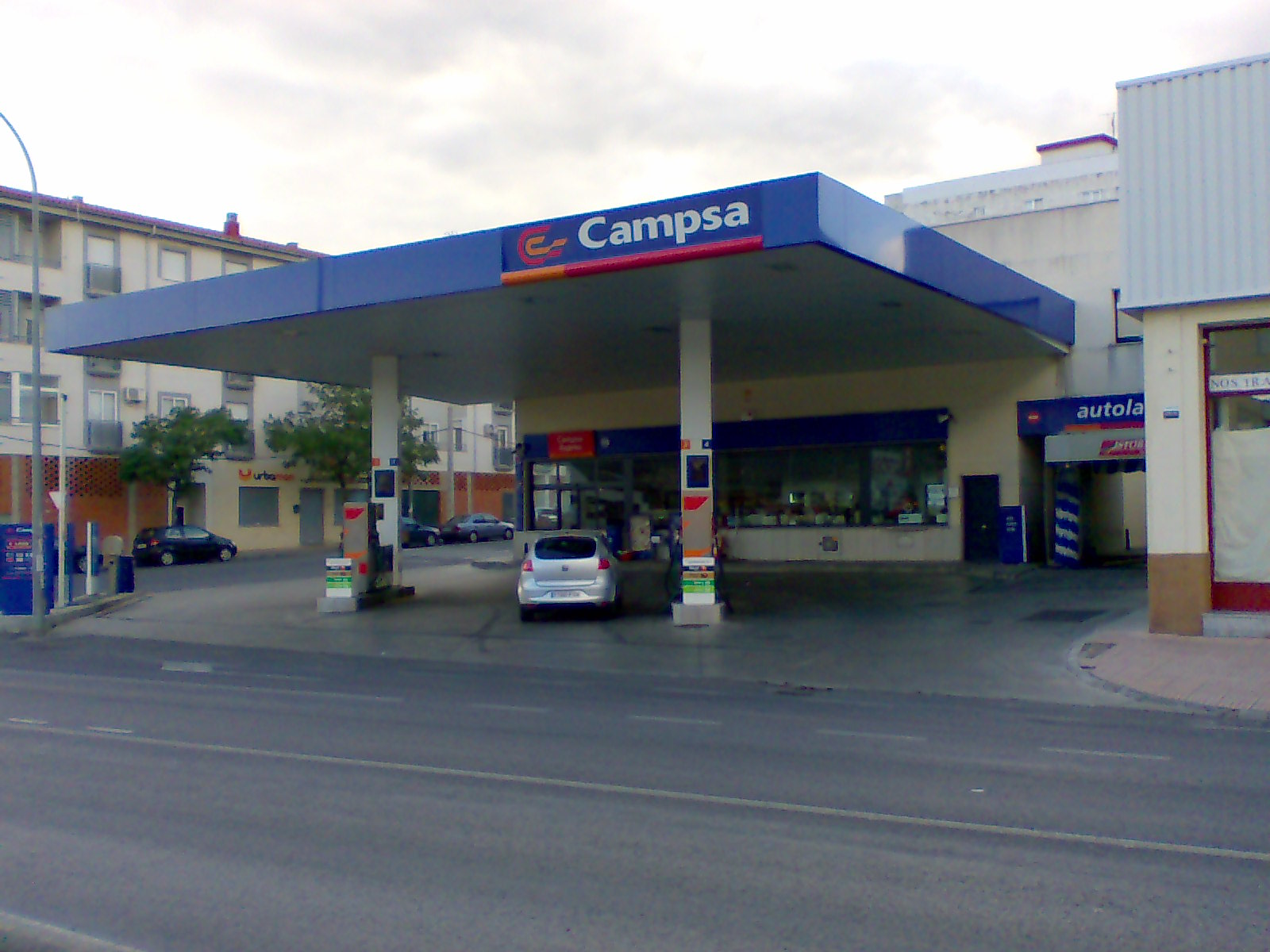 Gasolinera en Plasencia